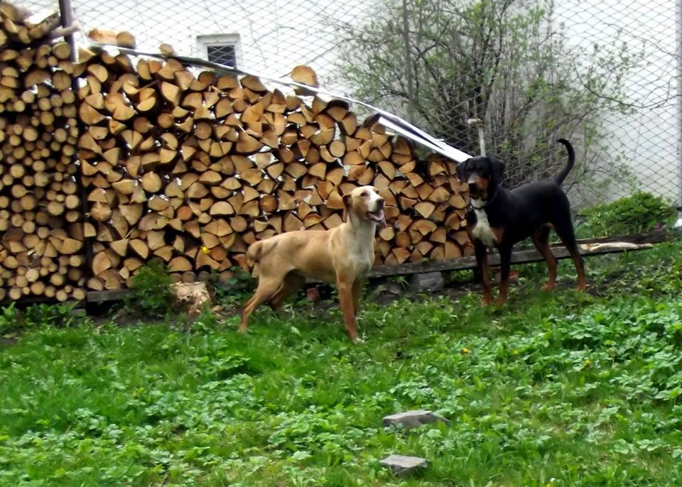 Varietati de copoi ardelenesc. Copoi ardelenesc roscat, copoi ardelenesc negru-marou.